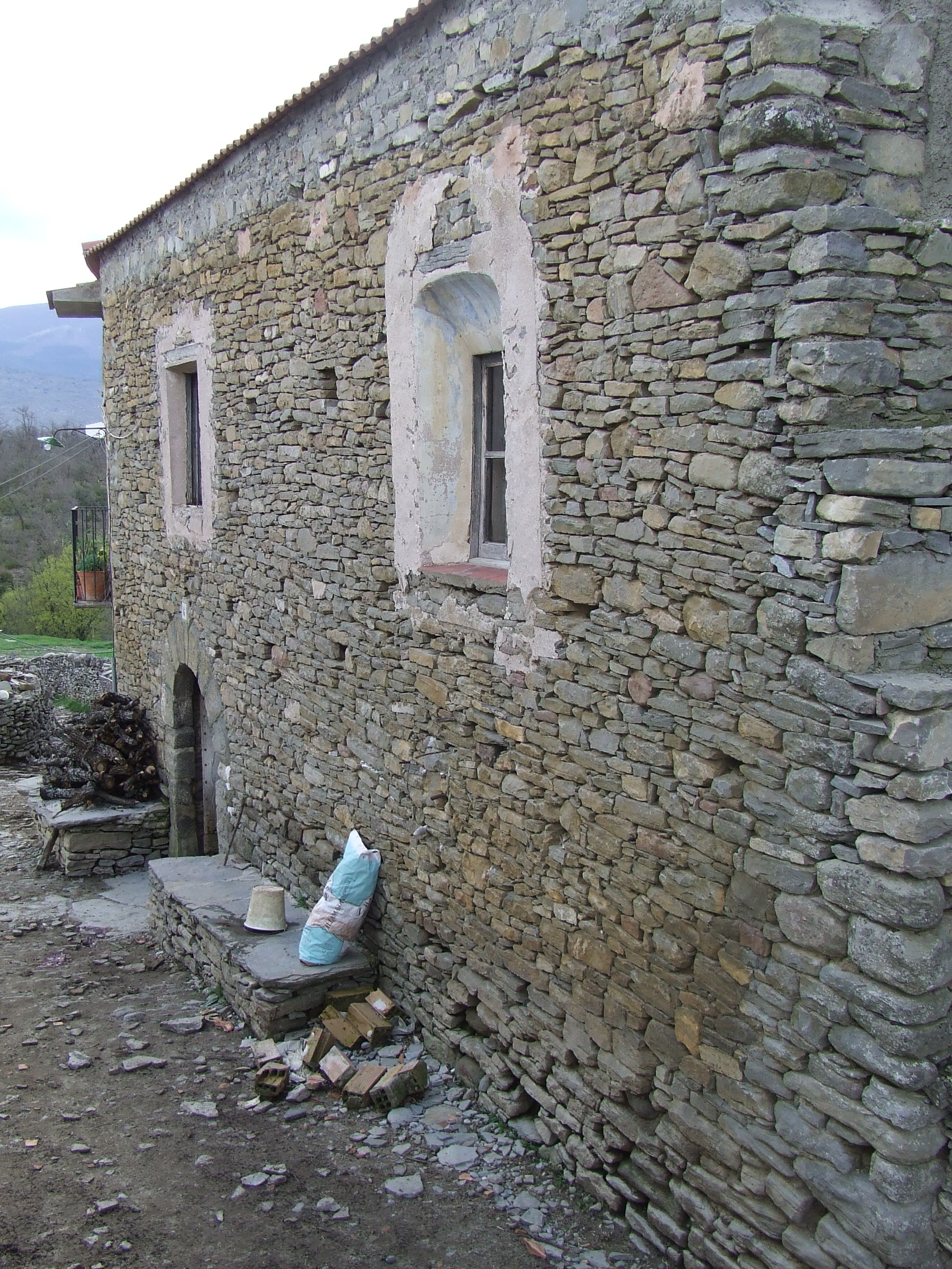 Façana de llevant de Casa Cortit (Castissent, Fígols de Tremp, Tremp, Pallars Jussà)